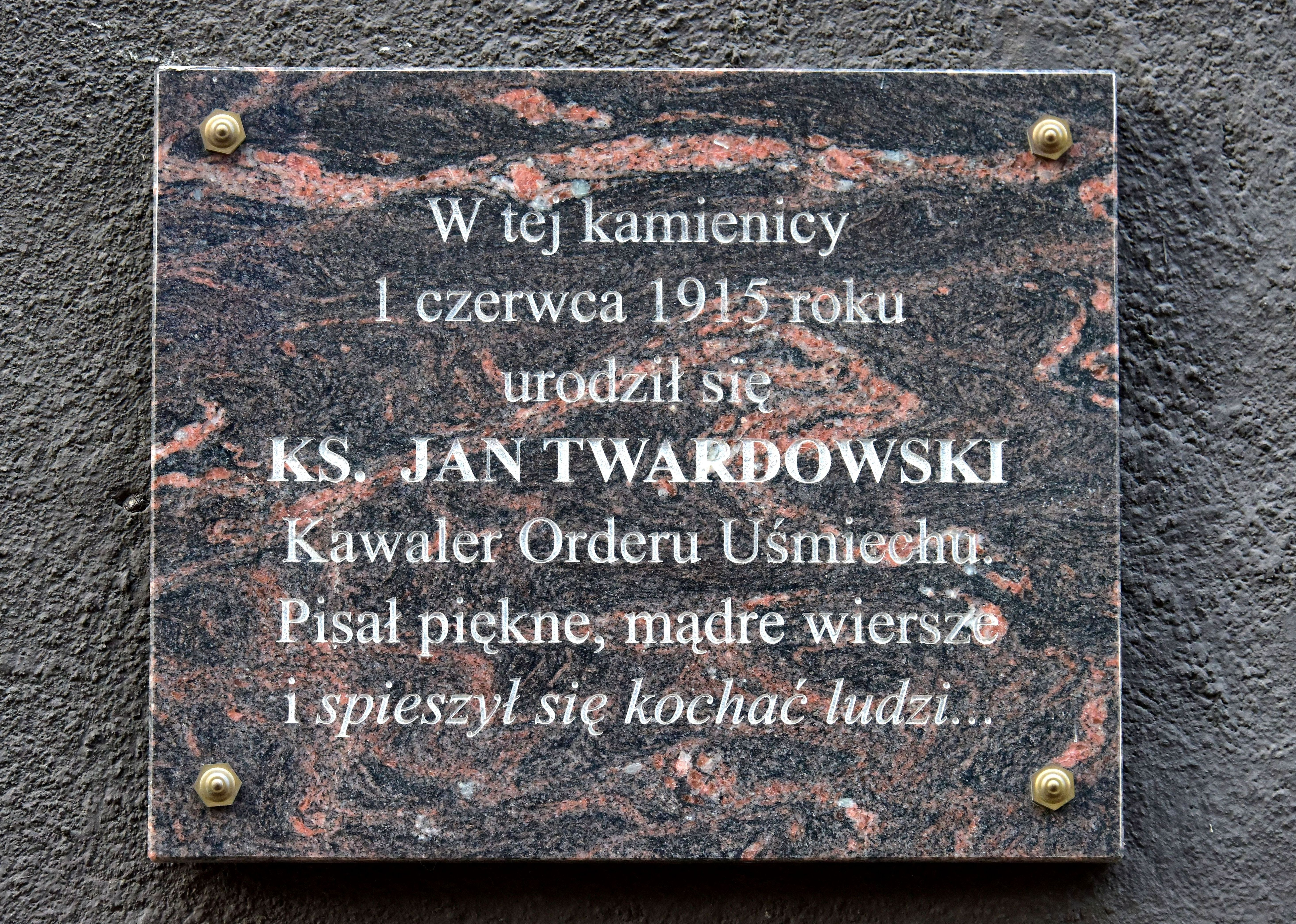 Tablica upamiętniająca ks. Jana Twardowskiego na fasadzie kamienicy przy ul. Koszykowej 20 w Warszawie